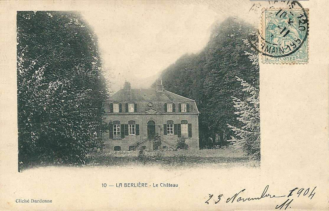 La Berlière - Le Château - Carte postale expédiée en 1904